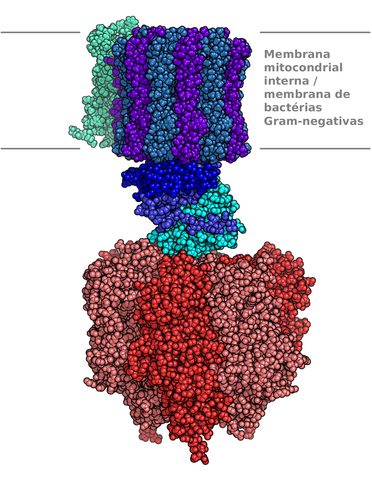 ATP sintase, usando 1QO1 como molde para combinar 1C17 (FO) e 1E79 (F1). PyMOL foi usado no rendering. Adaptado de Image:Atp synthase.PNG (traduzido para português).